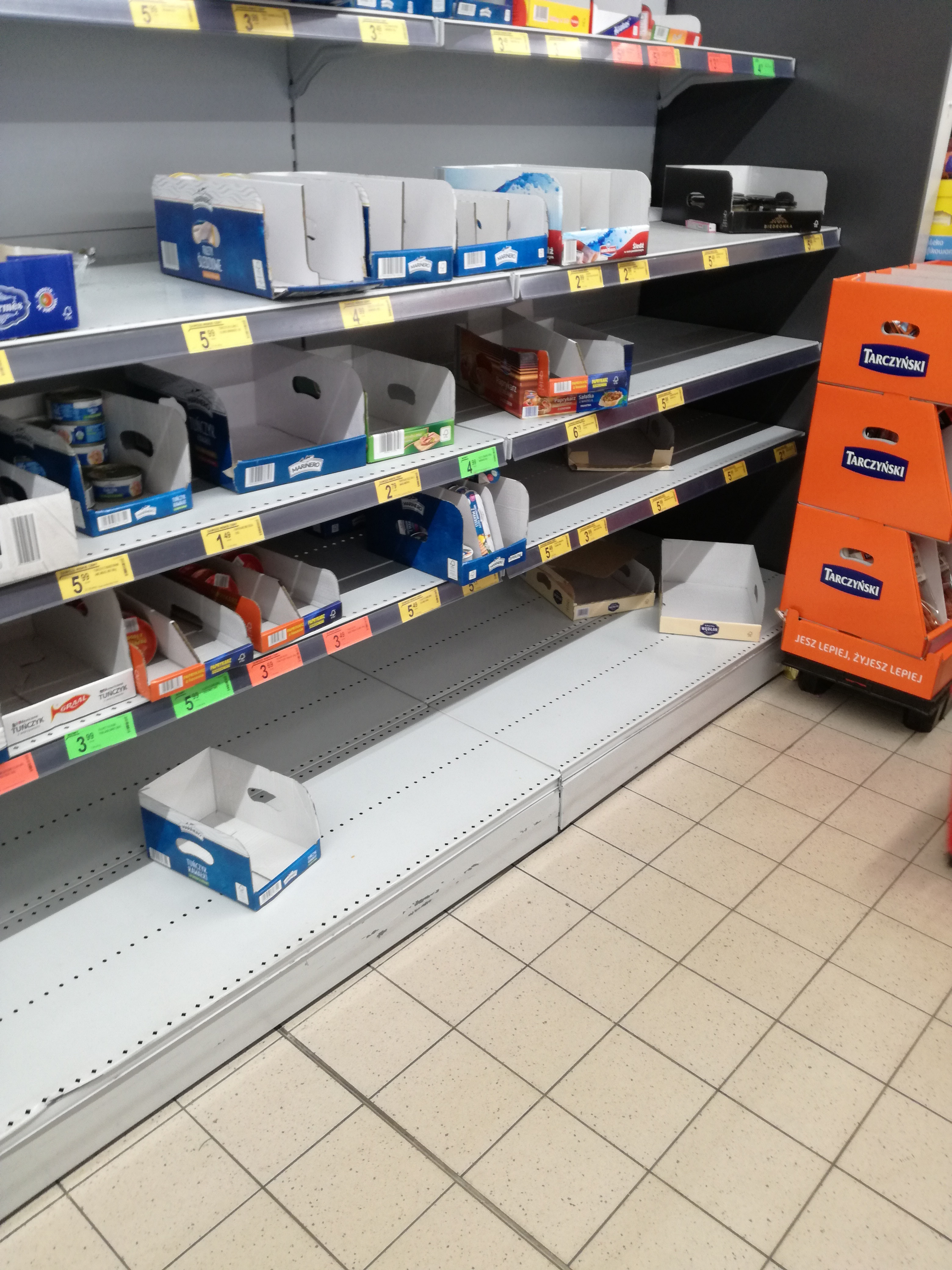 Puste półki w dyskoncie spożywczym